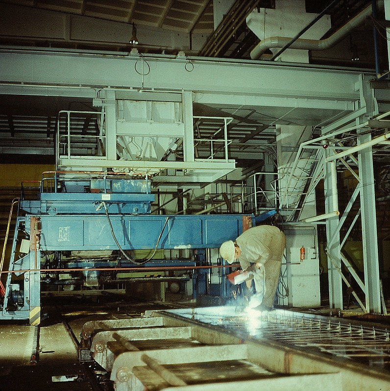 Original image description from the Deutsche Fotothek Betonwerker